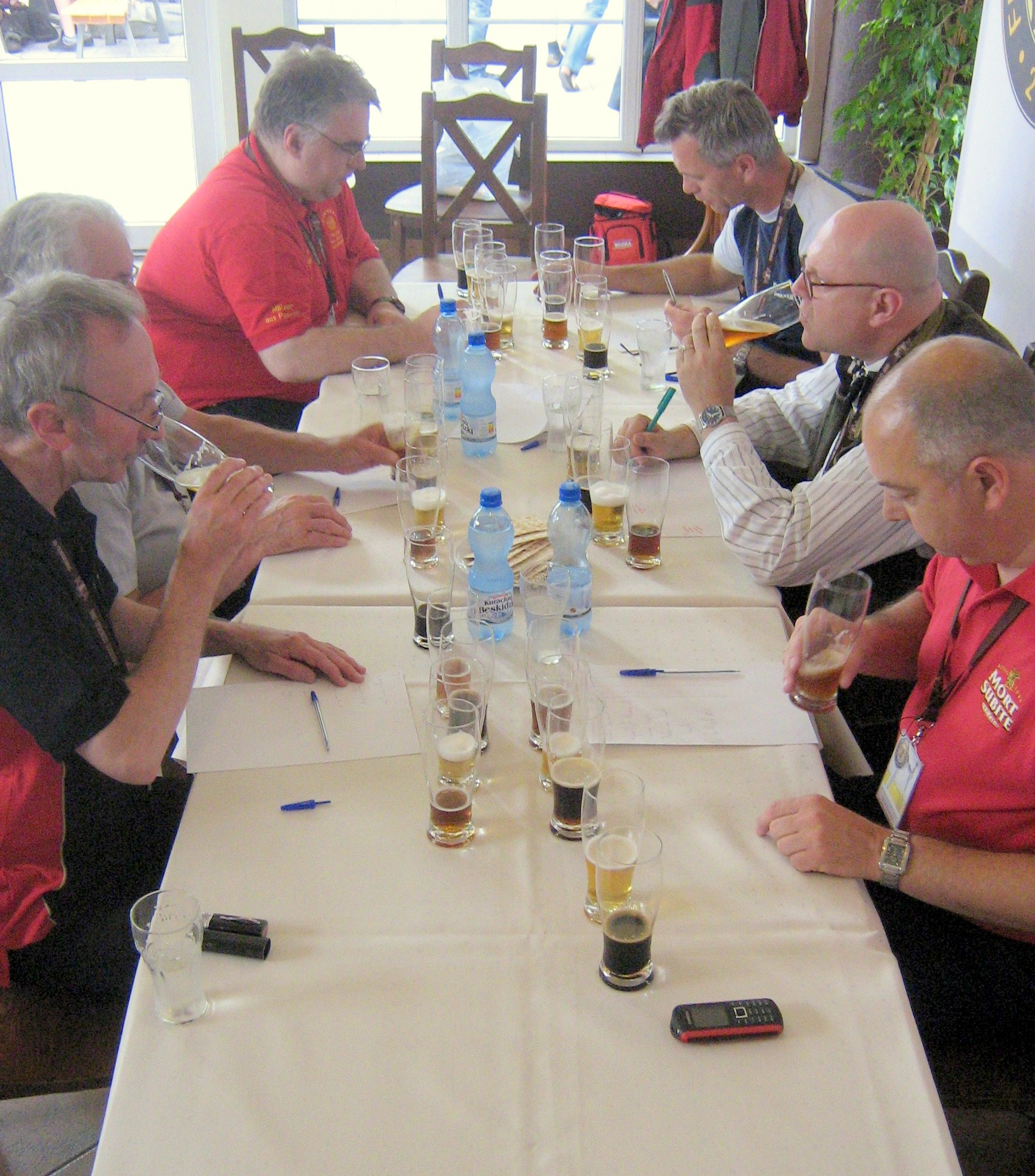 Obrady Grand Jury Festiwalu Birofilia 2011: Bruno Reinders (Belgia), Conrad Seidl (Austria), Martin Zuber (Niemcy), Andreas Richter (Niemcy), Ian Hornsey (Anglia), Don Jeffrey (Walia)